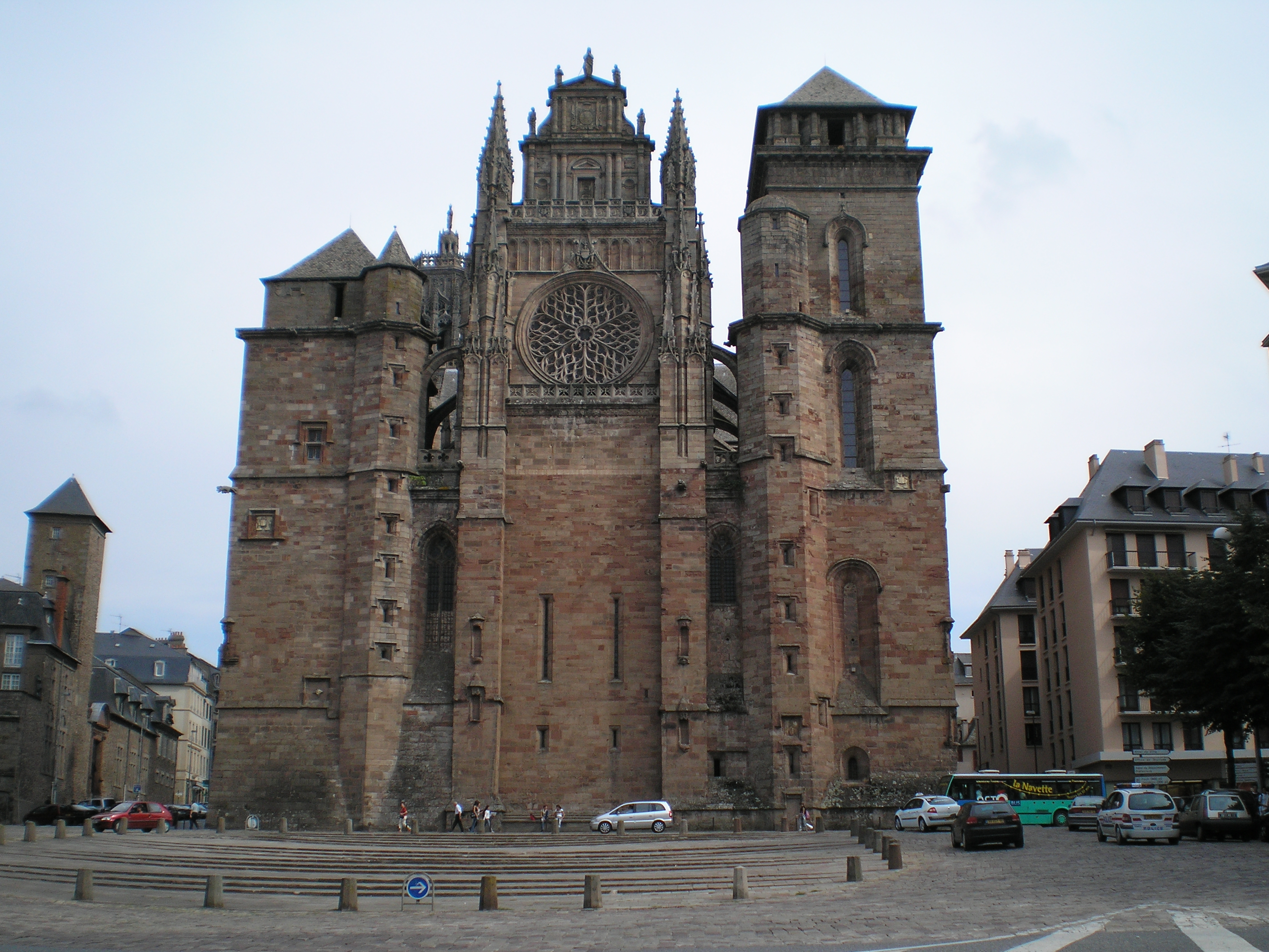 Rodez (Aveyron) - Façade occidentale de la cathédrale Notre-Dame.